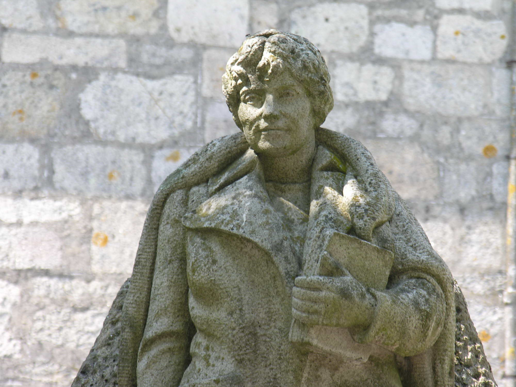 Estatua de Rosalía de Castro Padrón, Galicia Publish by= Luis Miguel Bugallo Sánchez.